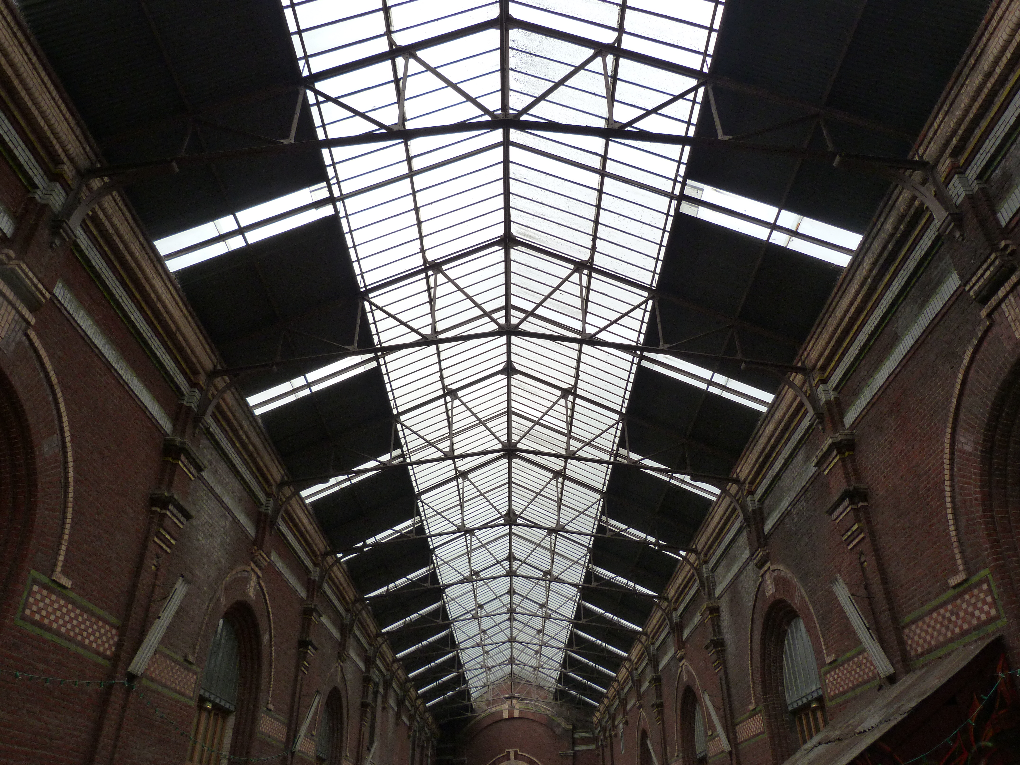 Verrière de l'ancien bâtiment du conditionnement de la laine datant de 1901, la condition publique a été réhabilitée en 2004 et est désormais un lieu de création et de diffusion artistique